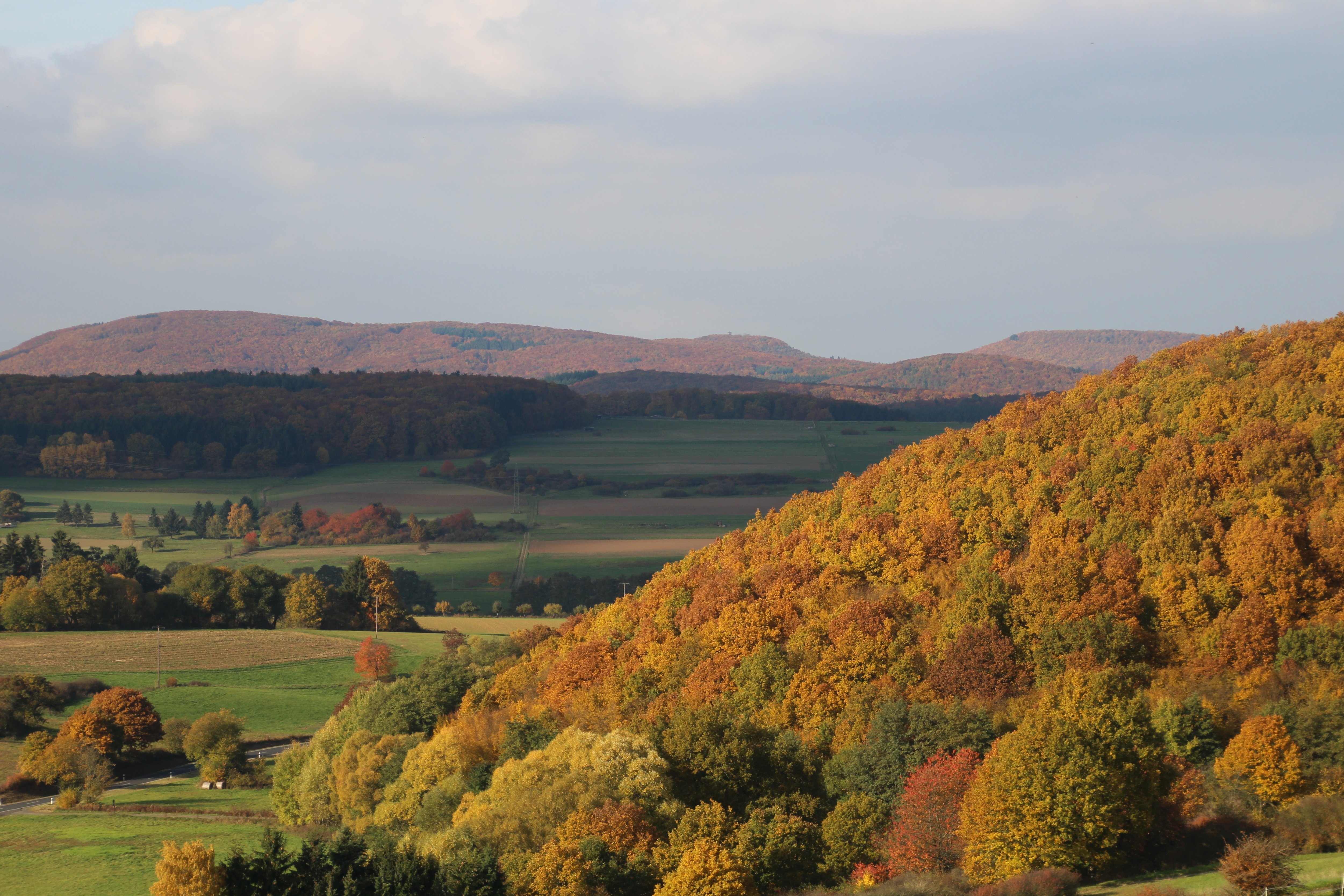 Markante Berge des Gladenbacher Berglands/der Zollbuche)